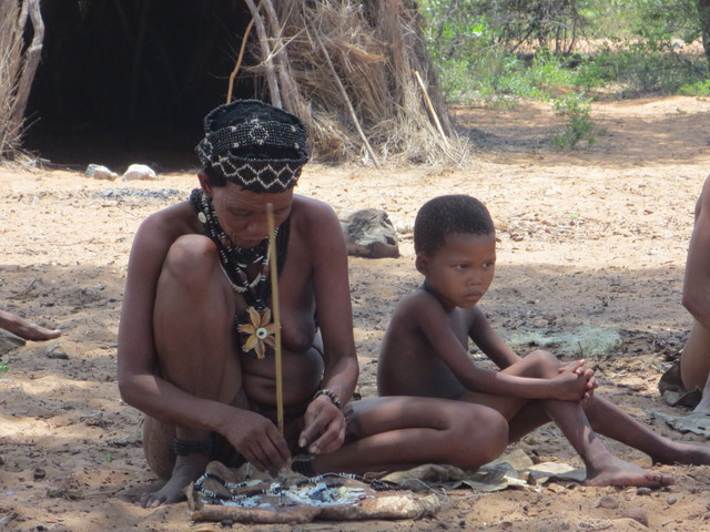 San Frau bohrt ein Loch in eine Scheibe vom Straussenei und fügt diese zu einer Schmuckkette zusammen.